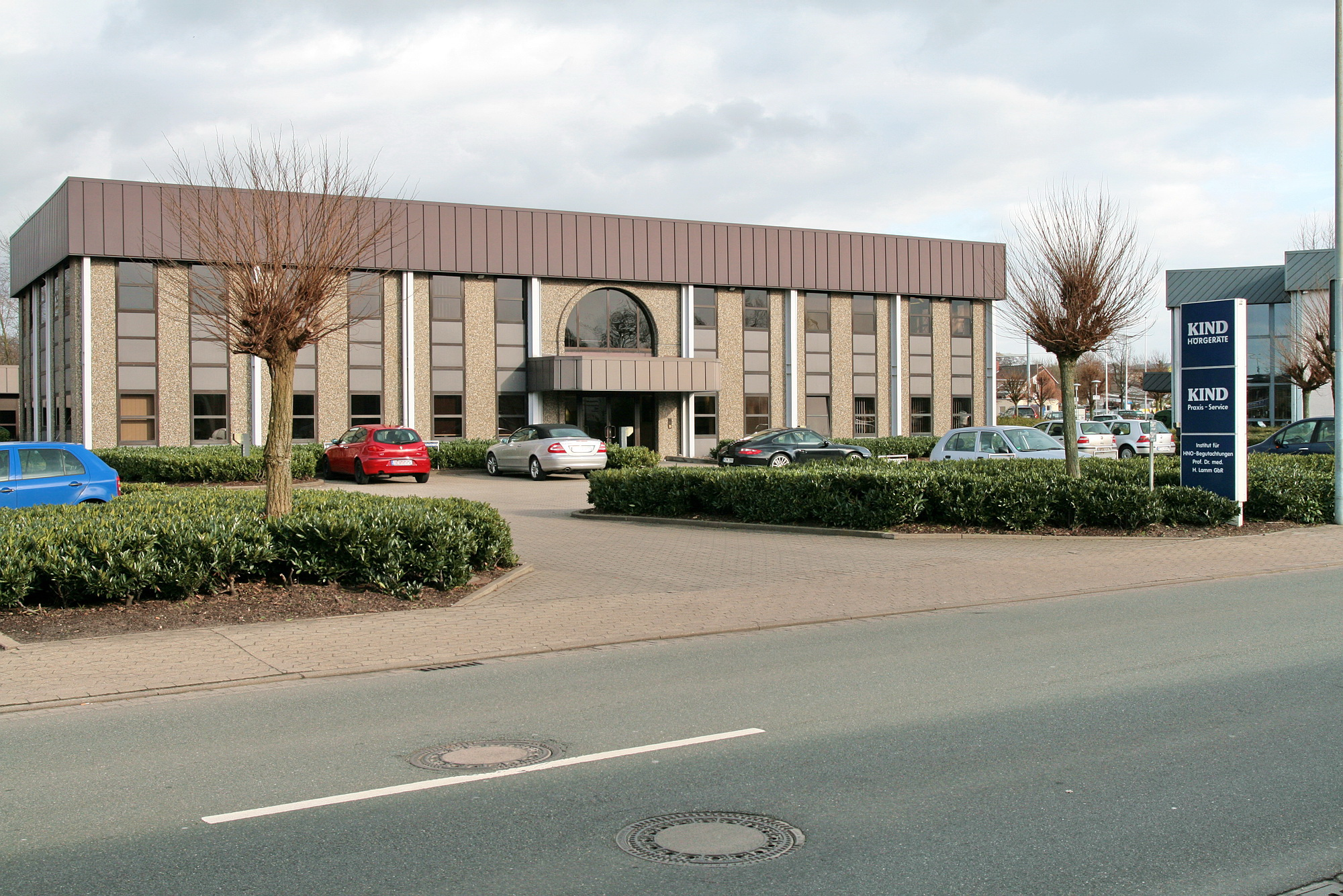 Firmensitz KIND in Großburgwedel (Burgwedel), Niedersachsen, Deutschland.